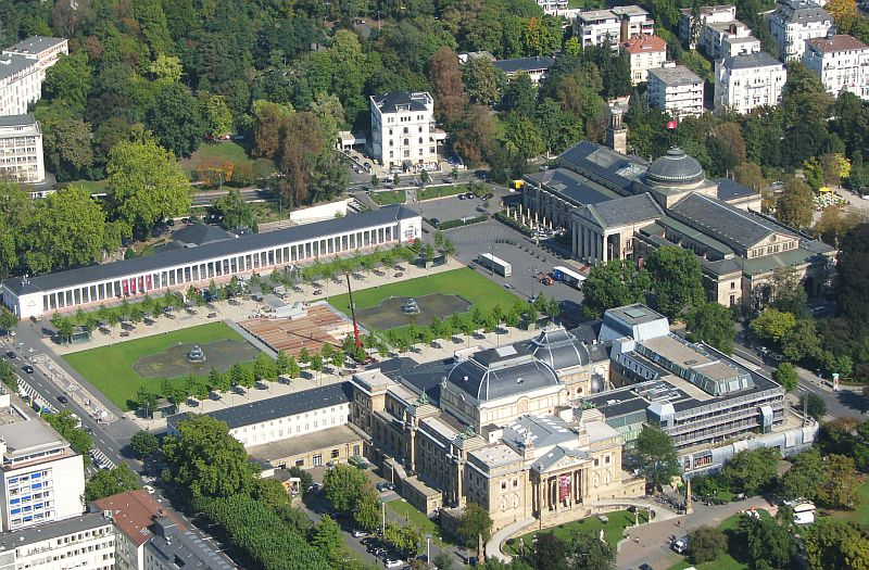 Wiesbaden Luftbild Kurhaus Spielbank links die Kolonnaden Bowling Green vorne Hessische Staatstheater Foto Wolfgang Pehlemann Wiesbaden IMG_0218